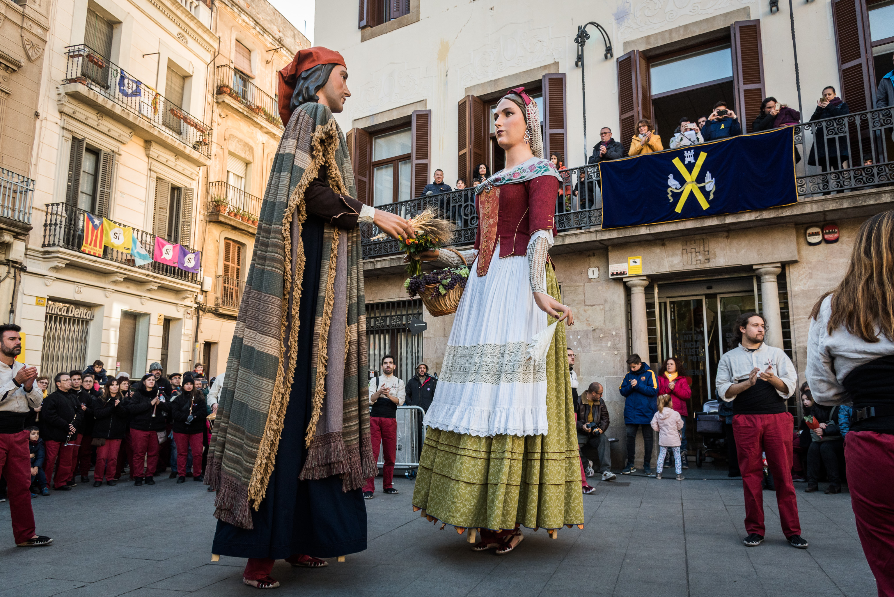 Gegants de Sant Andreu ballant a la Seu del Districte. Foto del Districte de Sant Andreu